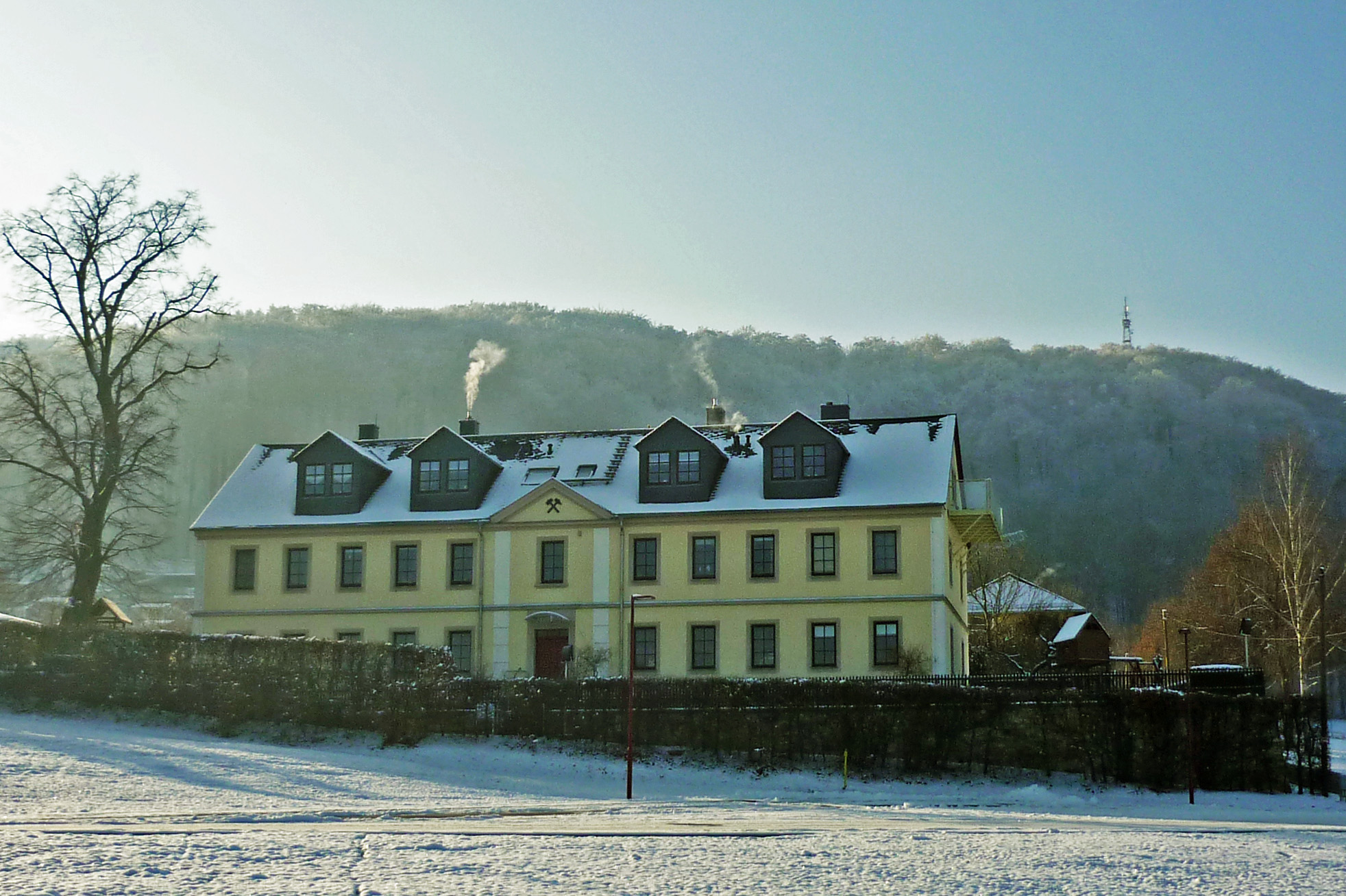 Freital-Burgk, Windbergallee 4 (Beamtenwohnhaus)